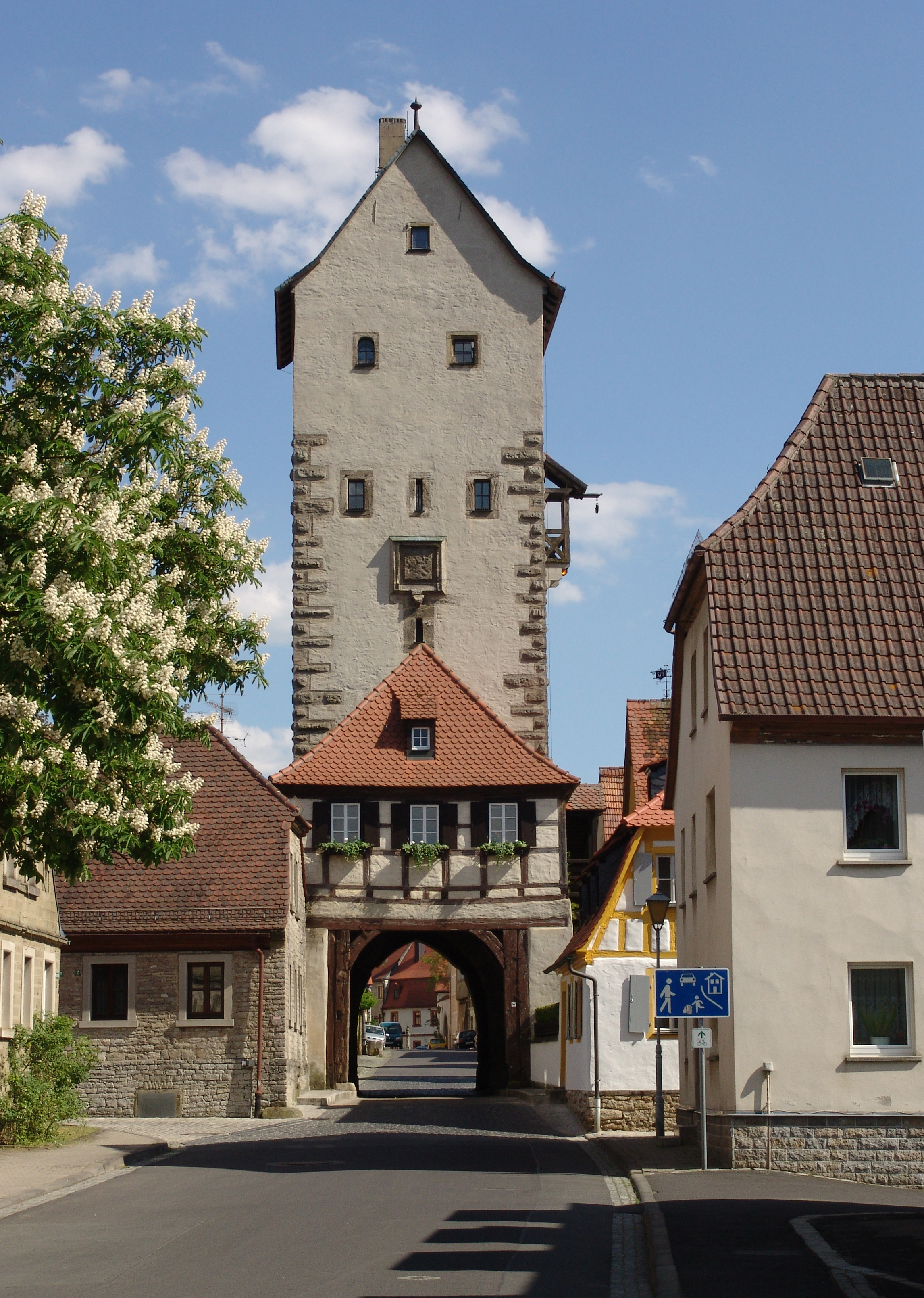 Mainbernheim-Unteres Tor